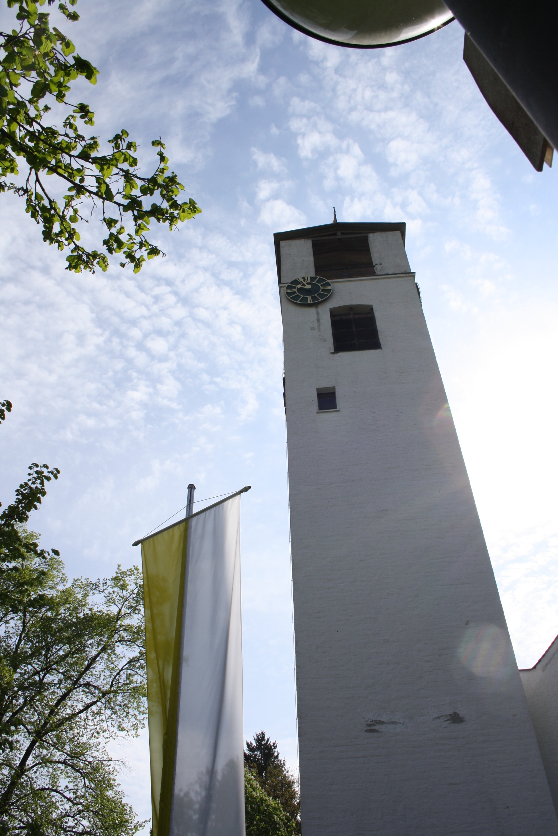 Der Turm von St. Raphael in München-Hartmannshofen